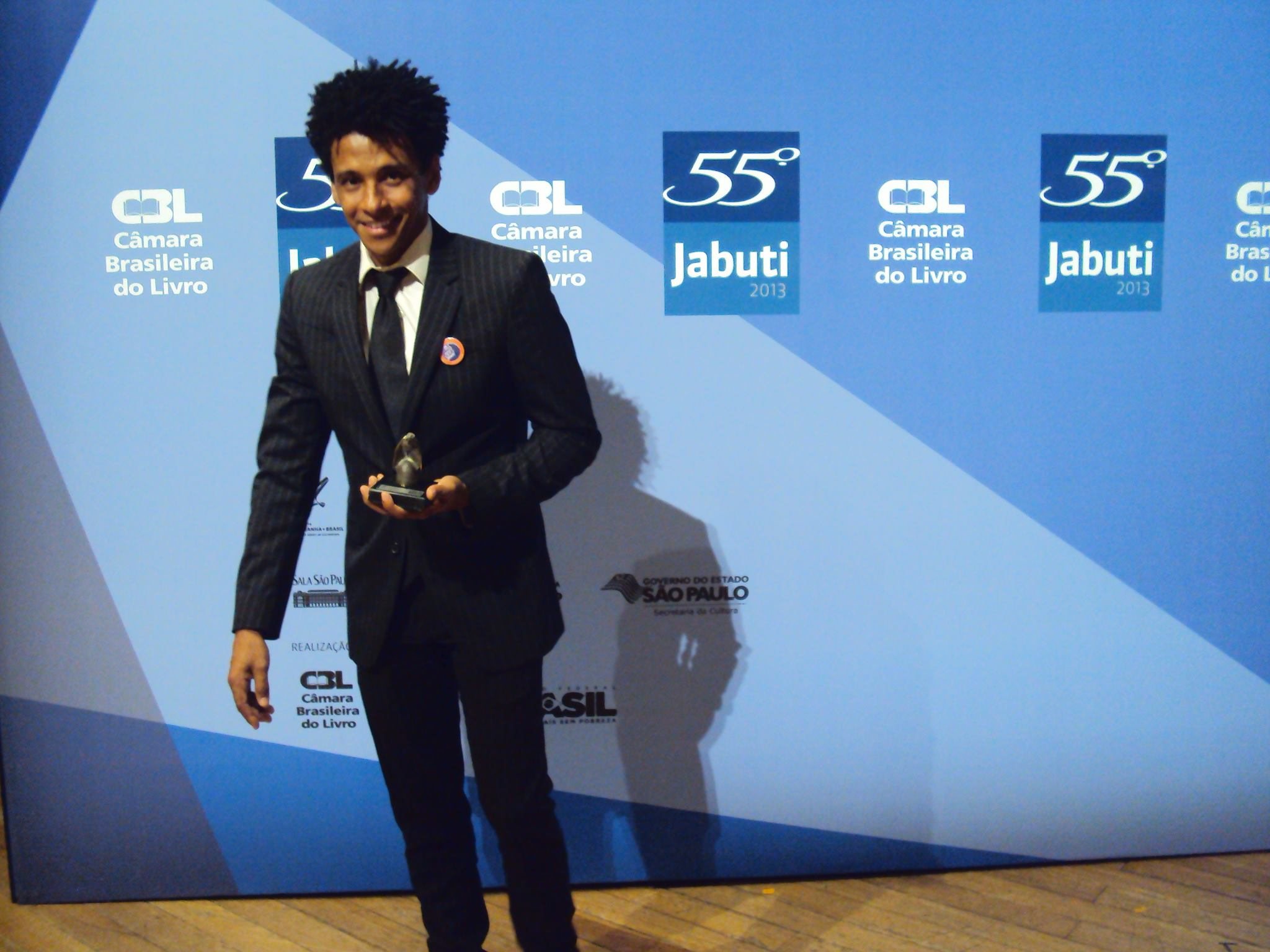 Aldri Anunciação recebe o prêmio Jabuti de Literatura 2013 na categoria Ficção Juvenil. Câmara Brasileira do Livro - São Paulo/SP.